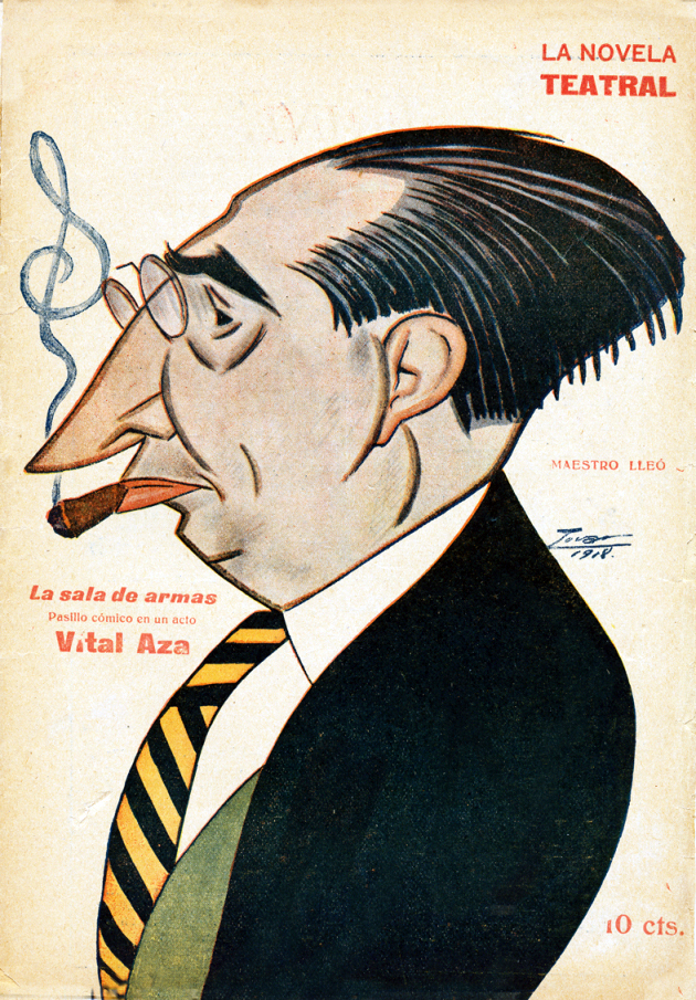 Caricatura del Maestro Lleó.